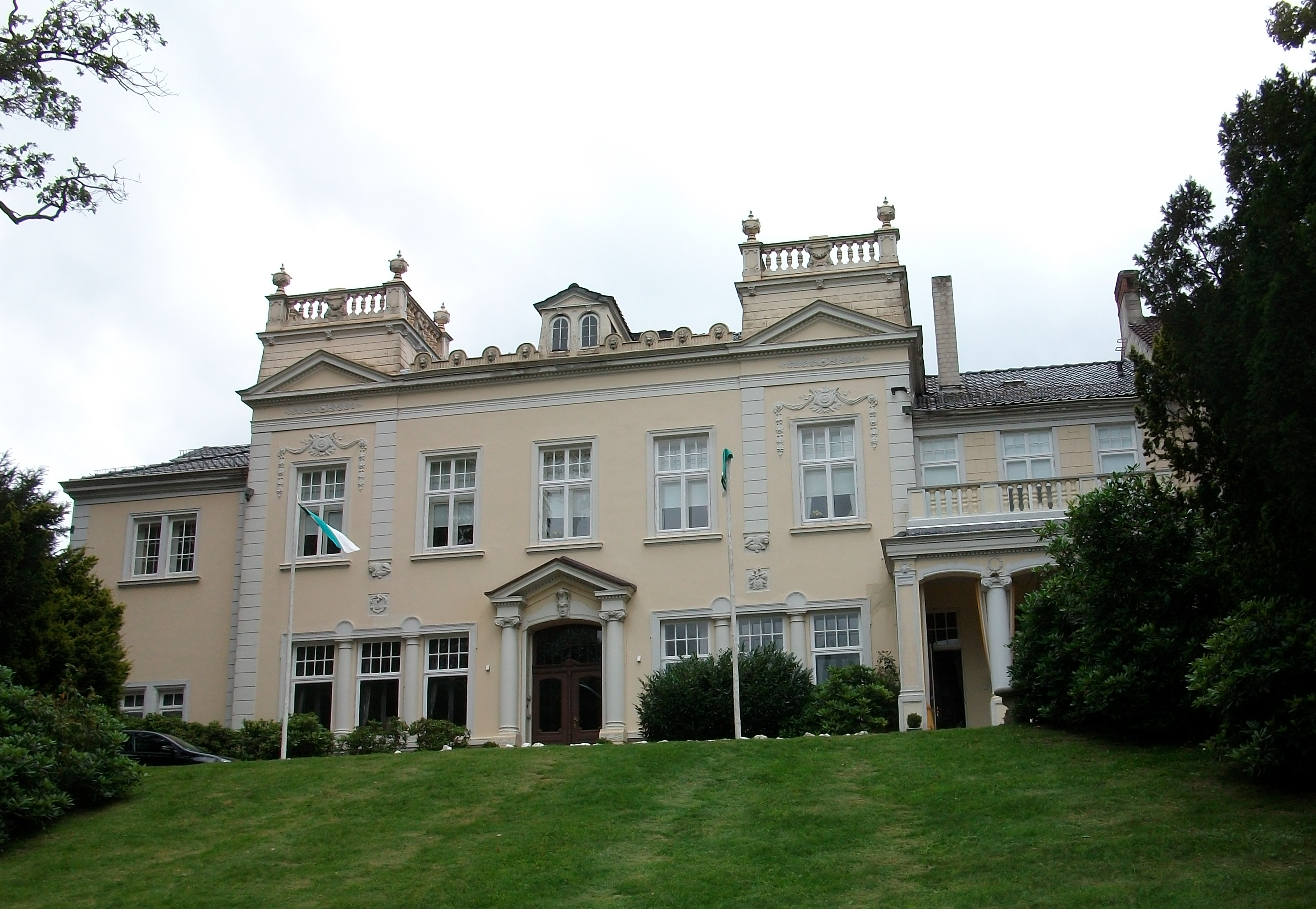 Herrenhaus Rittergut Valenbrook, Fickmühlen im Landkreis Cuxhaven (Germany)